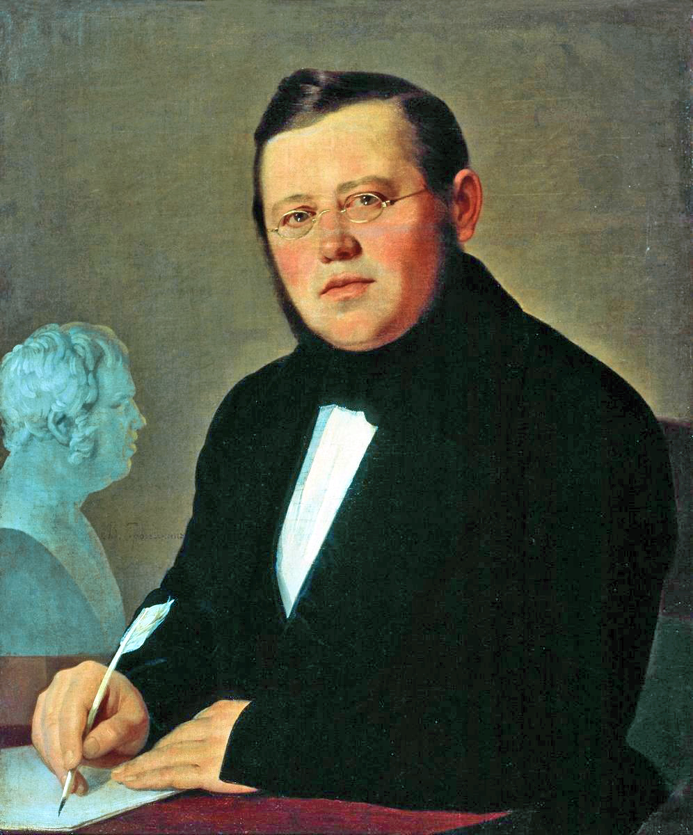 Загоскин Михаил Николаевич